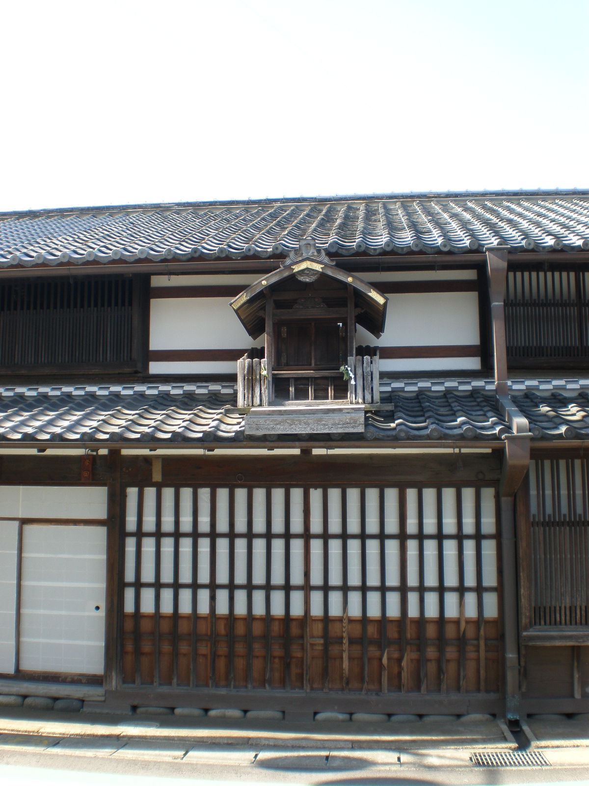 愛知県小牧市の旧家・岸田家の屋敷の屋根の上に設置された屋根神（やねがみ）の祠。